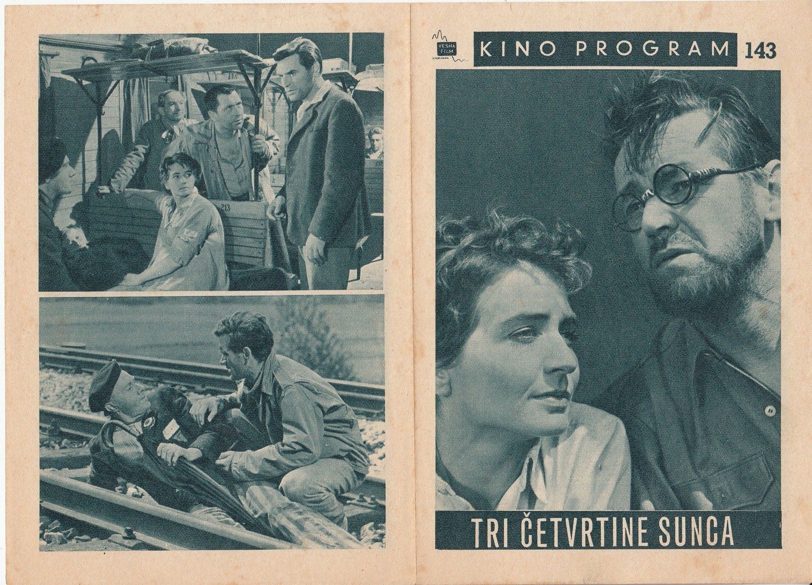 Brošura filma Tri četrtine sonca.